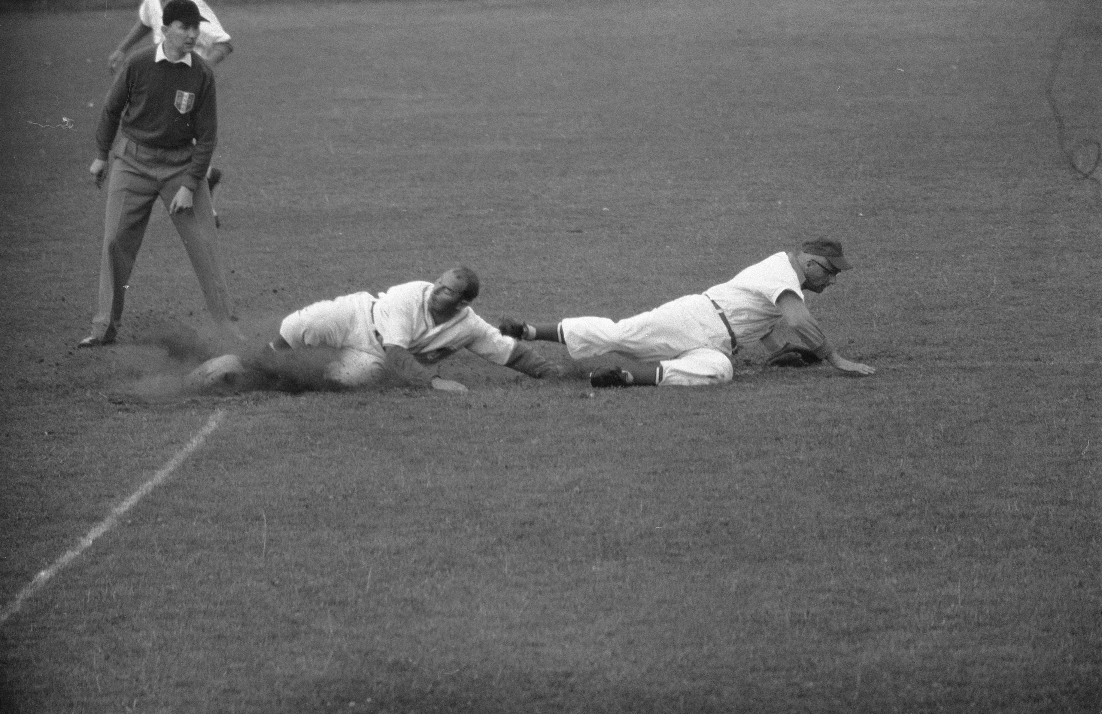 Collectie / Archief : Fotocollectie Anefo Reportage / Serie : [ onbekend ] Beschrijving : Honkbal EHS tegen HHC, links Heemskerk(EHS), Jongeling(HHC) Datum : 18 juli 1959 Fotograaf : Bilsen, Joop van / Anefo Auteursrechthebbende : Nationaal Archief Materiaalsoort : Negatief (zwart/wit) Nummer archiefinventaris : bekijk toegang 2.24.01.05 Bestanddeelnummer : 910-5360